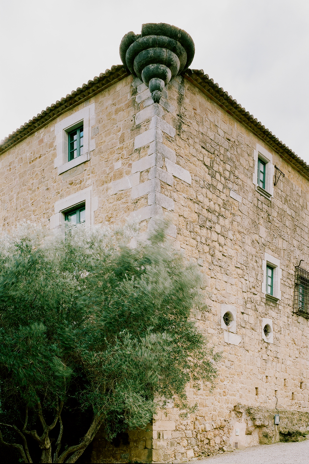 Façana nord-est, i en el angle superior hi ha la base de pedra de una de les sengles garites, amb la mènsula inferior esculpida, representant una petxina.